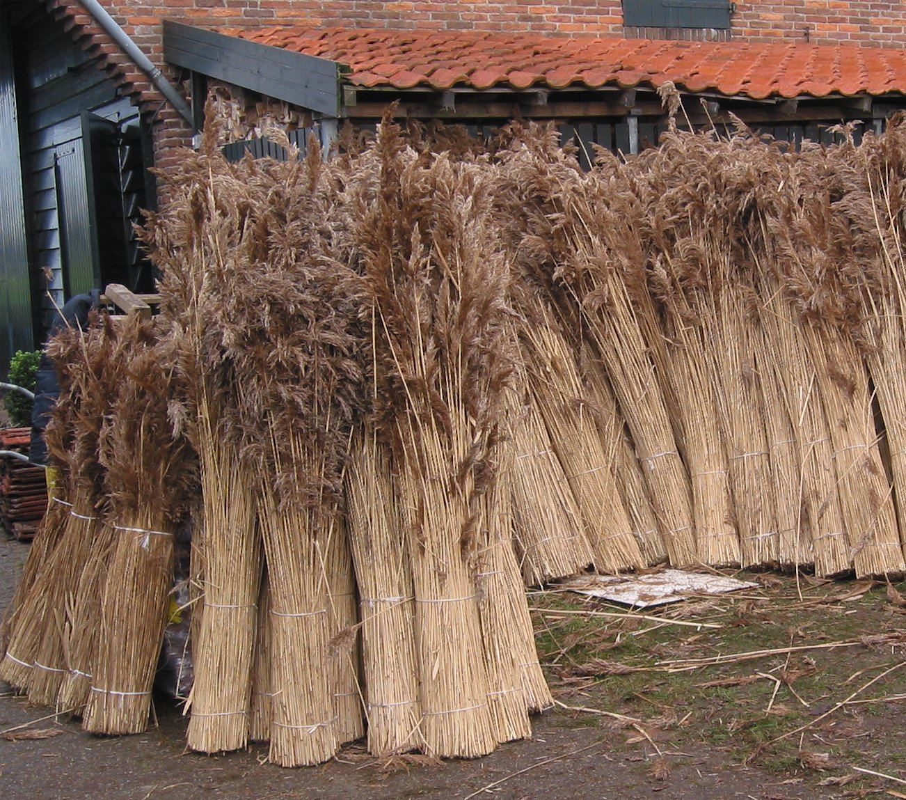 (nl: Riet (dakdekkersriet)) Phragmites australis for roof